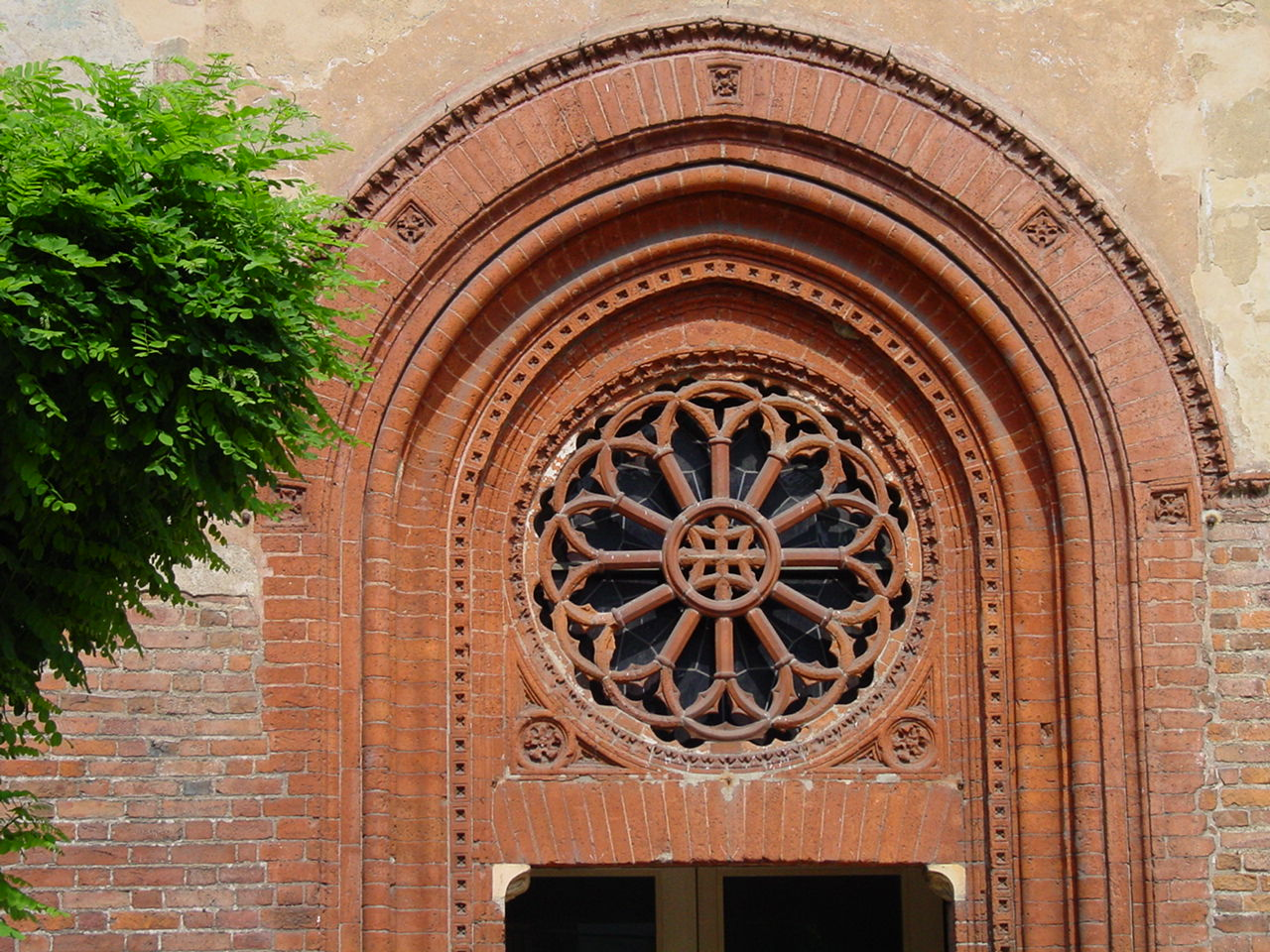 Rosone di Chiesa di San Cristoforo — Milano, Italia.